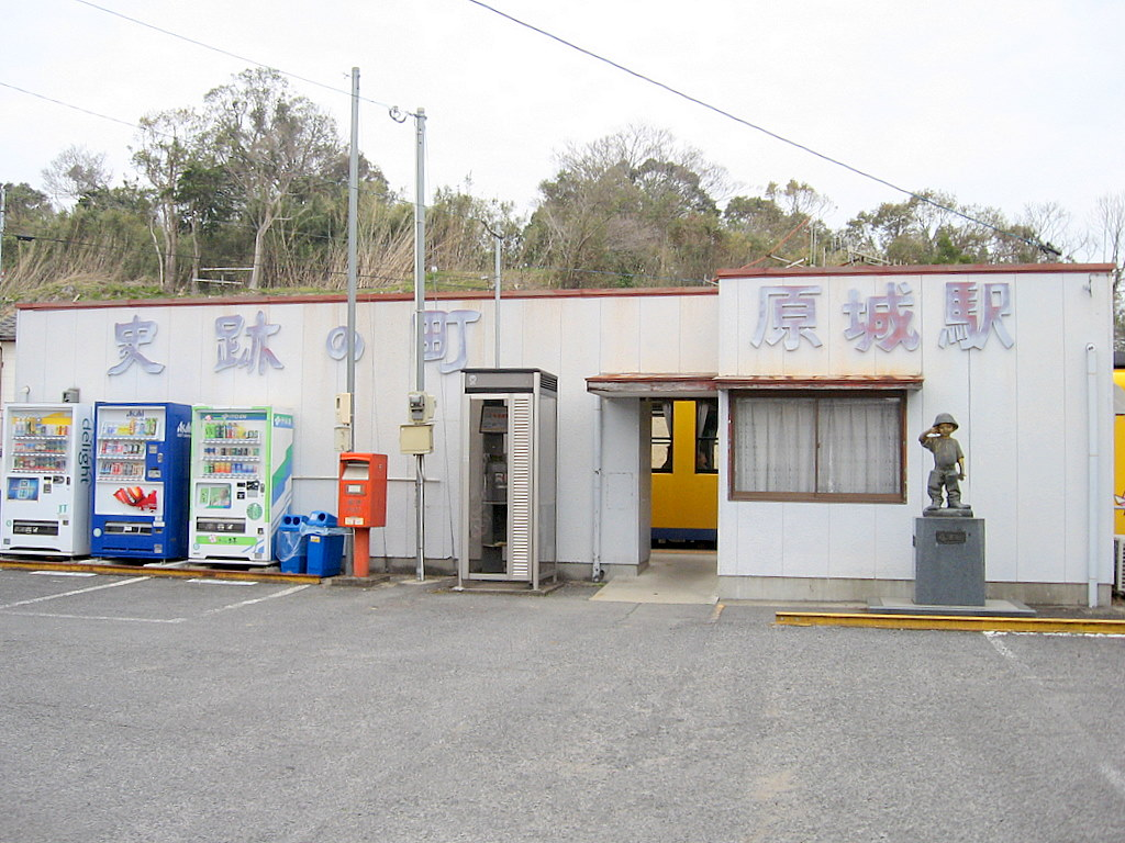 原城駅舎(2006.03.14に投稿者が撮影)